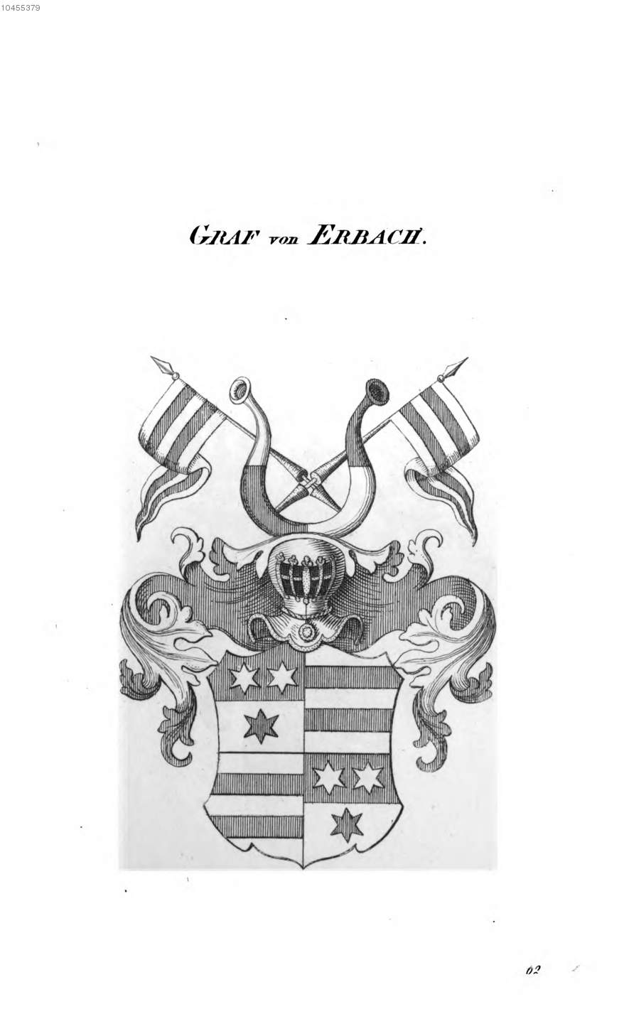 Berichtigung: Wappen Graf von Erbach